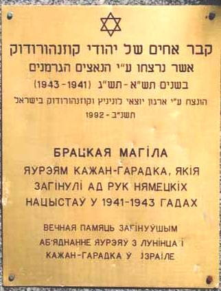 Надпись на памятнике на братской могиле евреев Кожан-Городка, убитых нацистами и полицаями 3 сентября 1942 года. Табличка с первого памятника вмурована внизу.